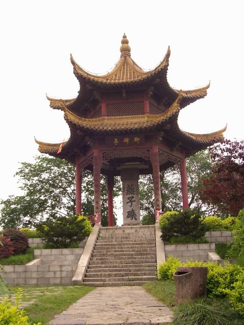 燕子磯 乾隆御碑 2004年5月15日撮影 撮影者：権作 参照：